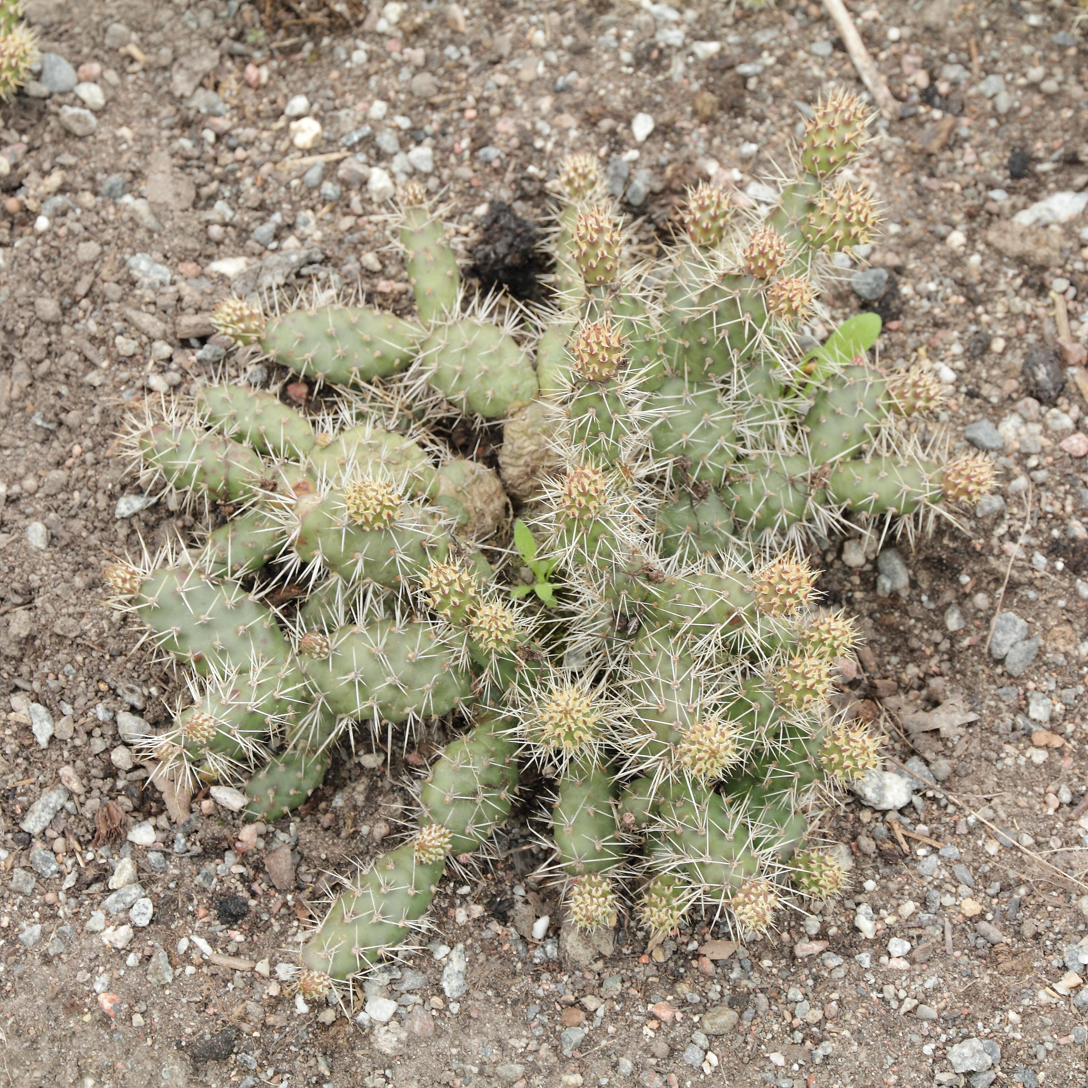 Opuntia fragilis i Bergianska trädgården.